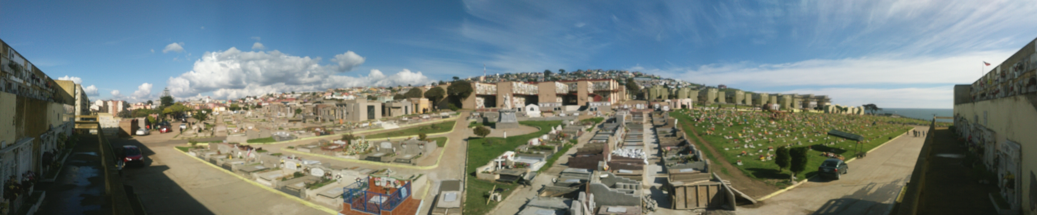 Vista Panorámica hacia las tumbas de tierra del cementerio 3 de Valparaíso.